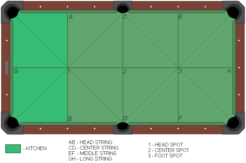 Schemat stołu bilardowego